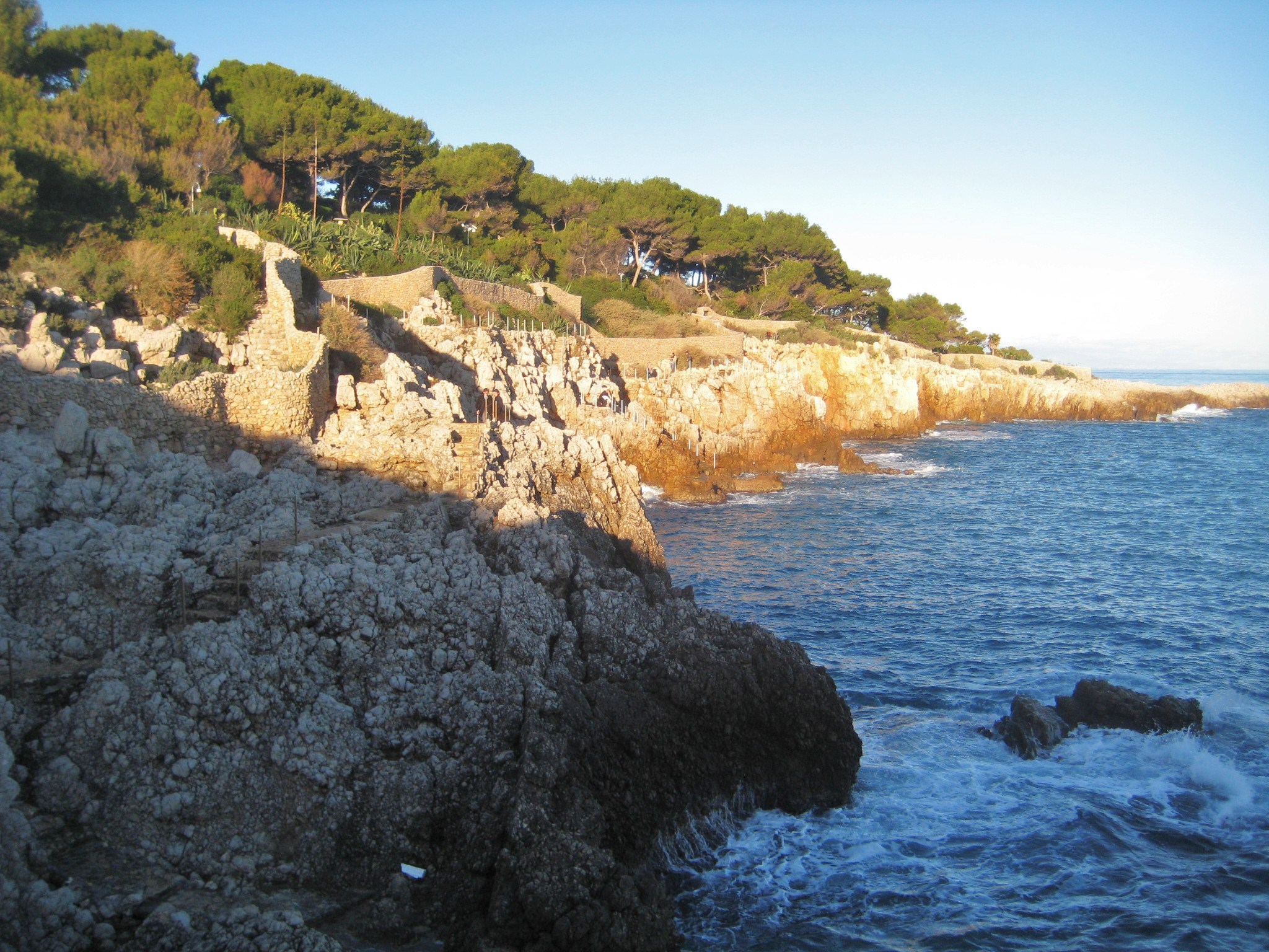 Description chemin des contrebandiers Antibes Cap chemin des contrebandiers Antibes Cap